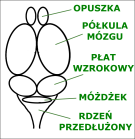 Schemat mózgowia żaby (i generalnie - niższych kręgowców)